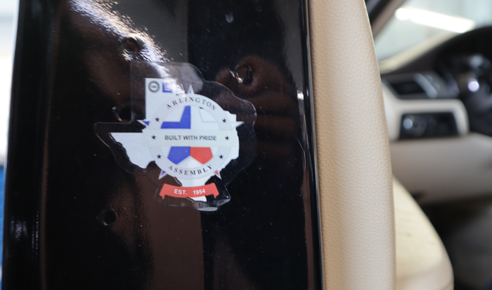 Werksaufkleber des Arlington Assembly auf der Fahrertür eines Cadillac Escalade (GMT926)